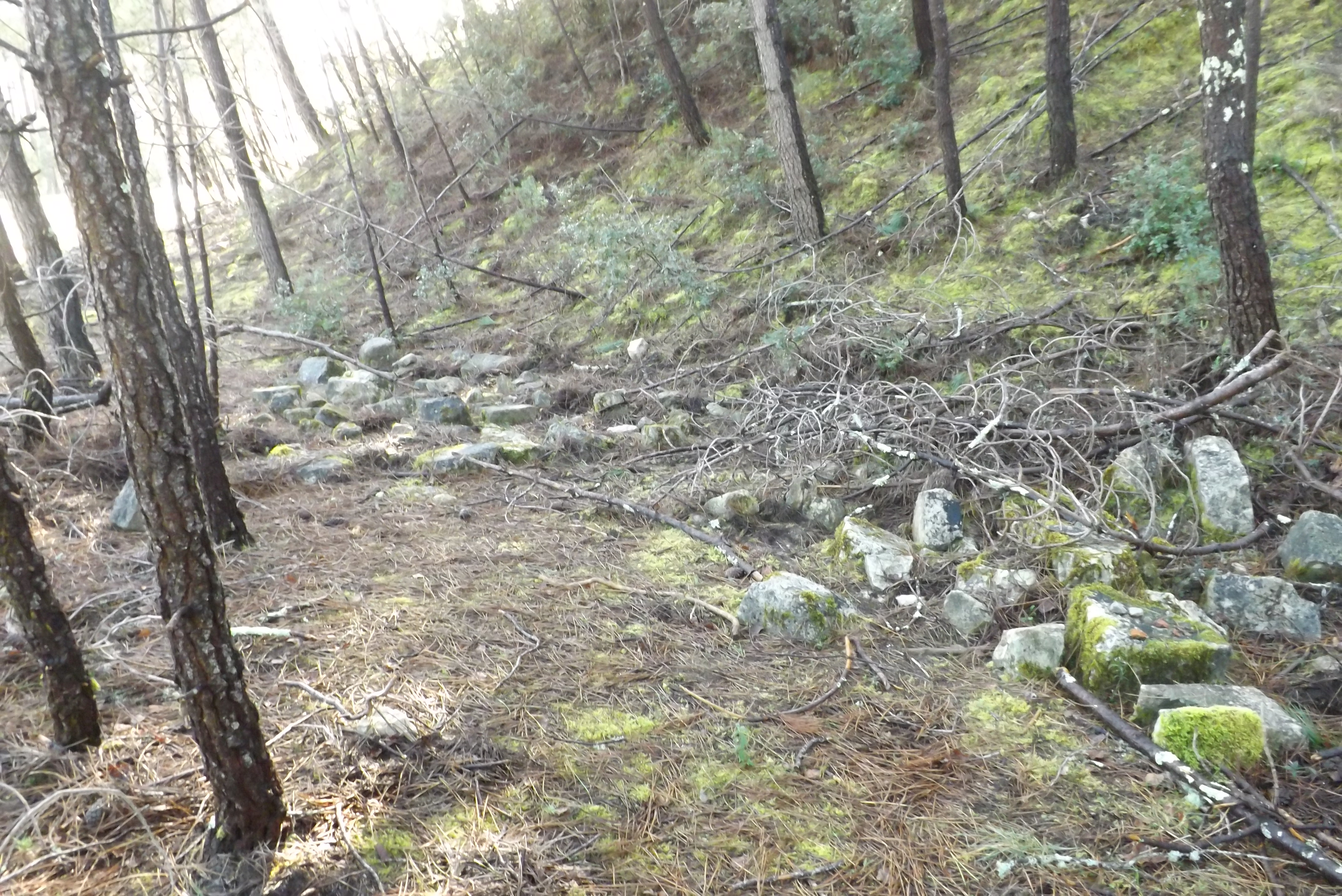 Vestige de la Chapelle de Buze dans la foret de la Coubre.